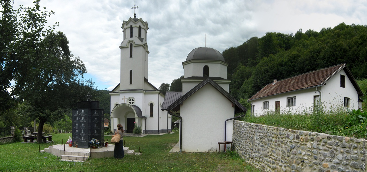 Лично фотографисано